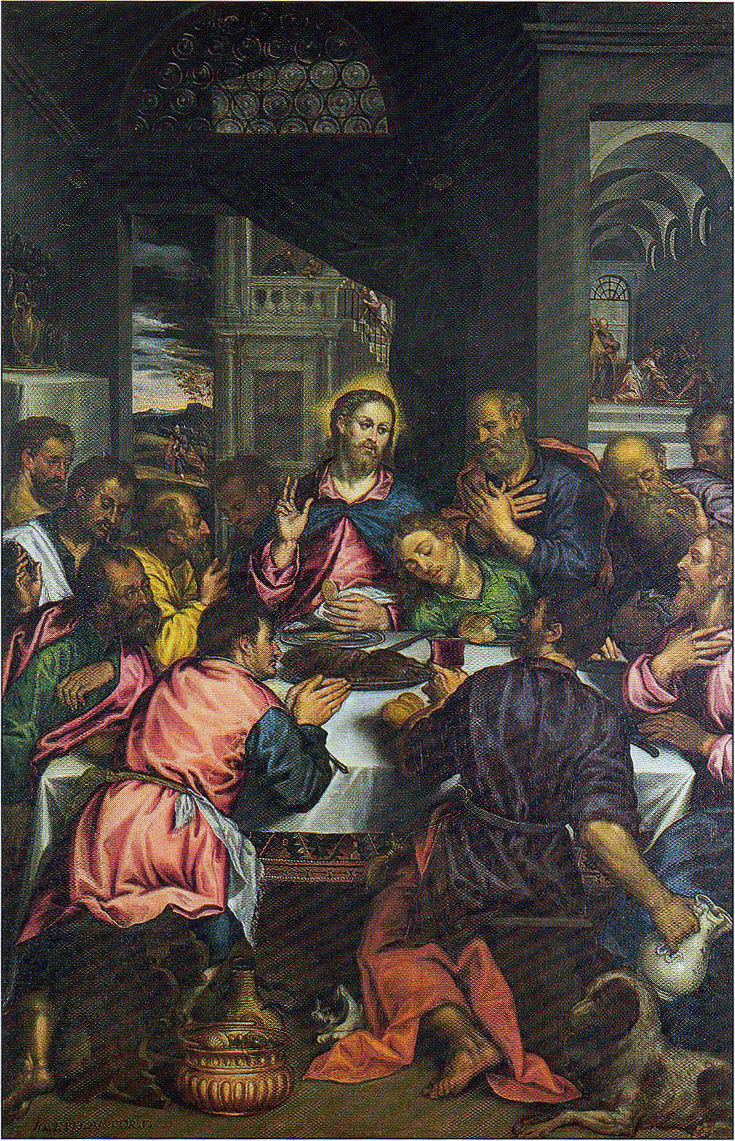 Comunione degli apostoli (giuseppe amatore)